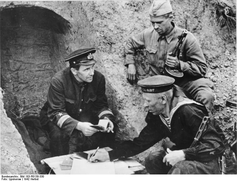 ADN-ZB/Lipskerow II. Weltkrieg 1939-45 Während der Schlacht um Stalingrad erhalten ein Rotarmist und ein Matrose in der vordersten Linie ihre Parteidokumente [von einem Politkommissar ?], Herbst 1942.